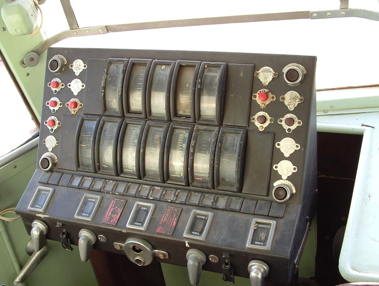 banco automotrice RALn60